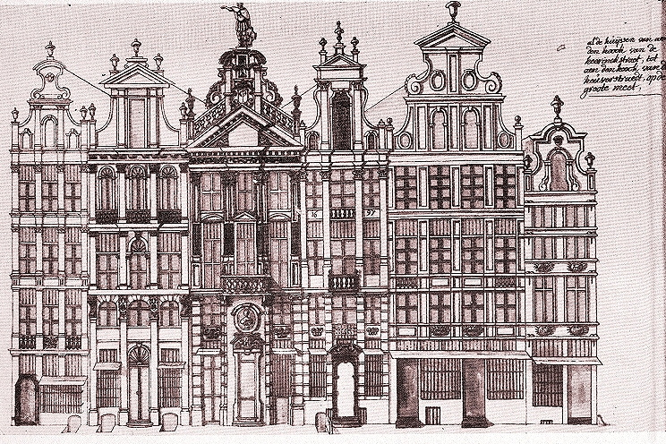 Maisons de la Grand-Place de Bruxelles, d'après F.J. De Rons dessins et aquarelles exécutés de 1729 à 1749. De gauche à droite: Le Marchand d'or, Le Pigeon, La Chaloupe d'or, L'Ange, Joseph et Anne, Le Cerf Volant.